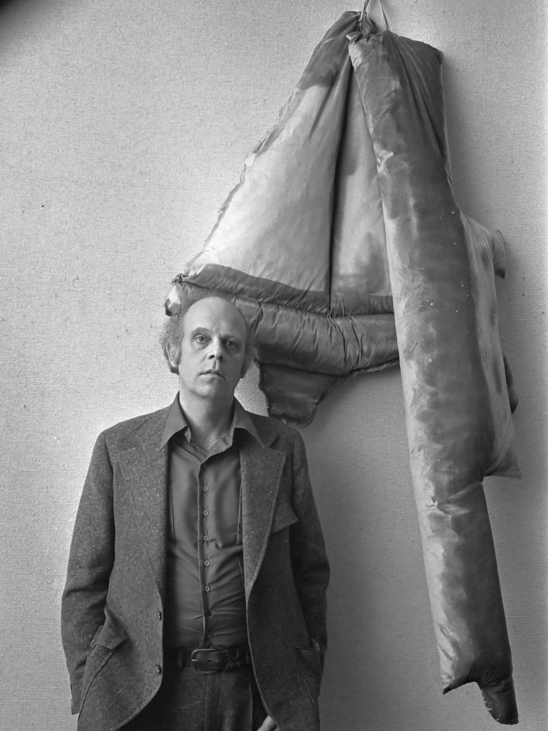 Tentoonstelling van het werk van Claes Oldenburg (USA) in Stedelijk Museum Amsterdam